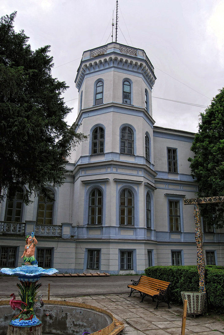 Sannicolau Mare, jud Timis Cod LMI TM-II- m-A-06287